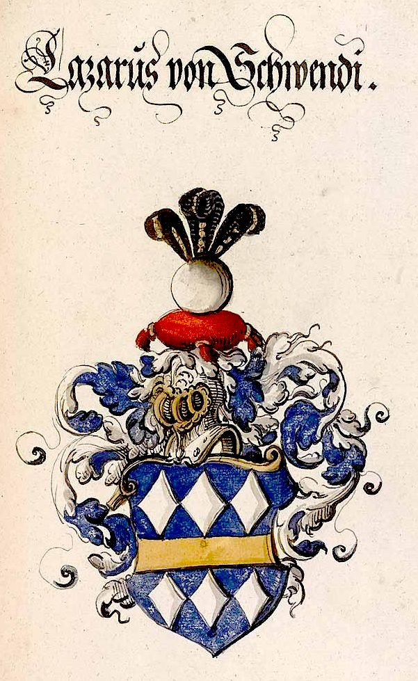 Wappen Lazarus von Schwendi aus einem unbekanntem Wappenbuch